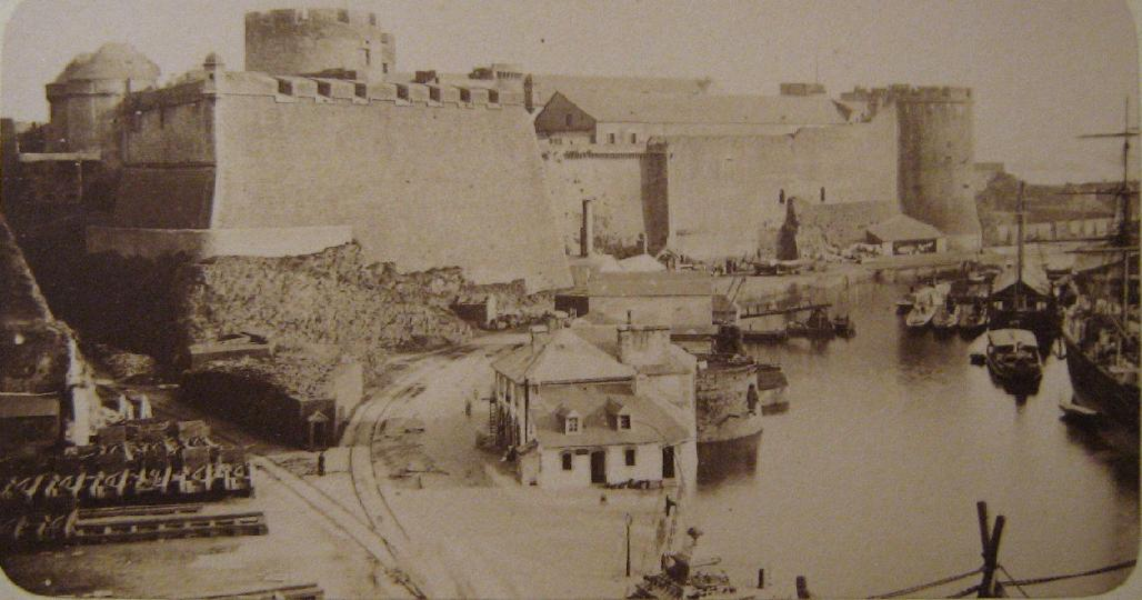 Fortet i Brest, någon gång sent 1860-tal eller tidigt 1870-tal.